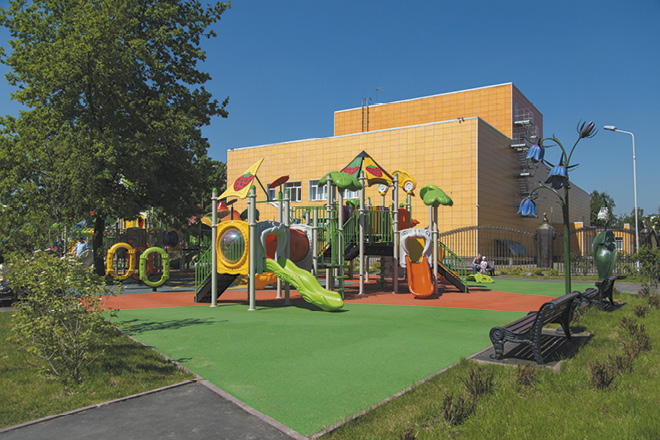 Детский сад. Совхоз имени Ленина (Ленинский район Московской области)